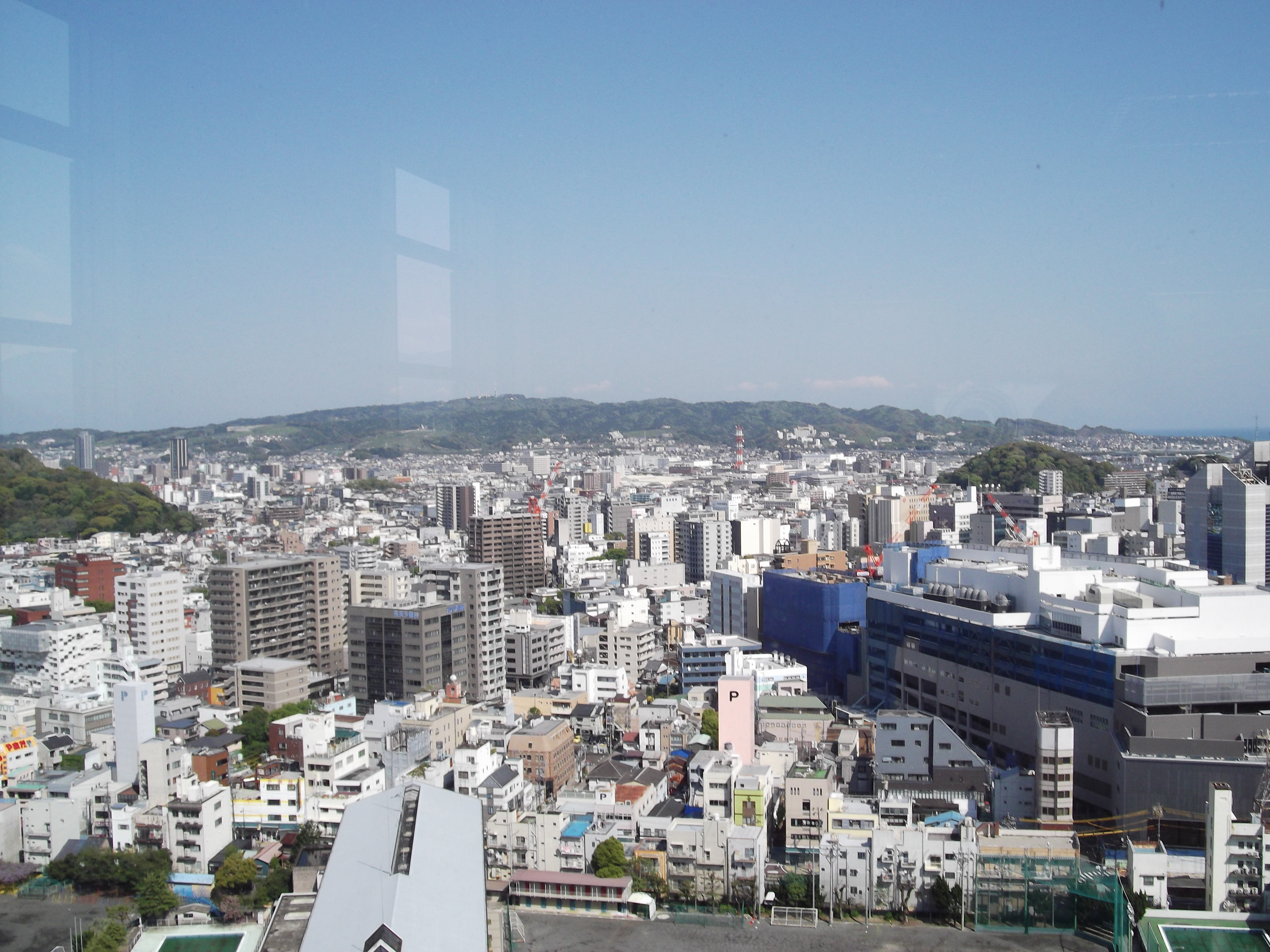 静岡県庁舎別館２１階展望デッキから見た日本平。左の緑地は谷津山。右の緑地は八幡山。